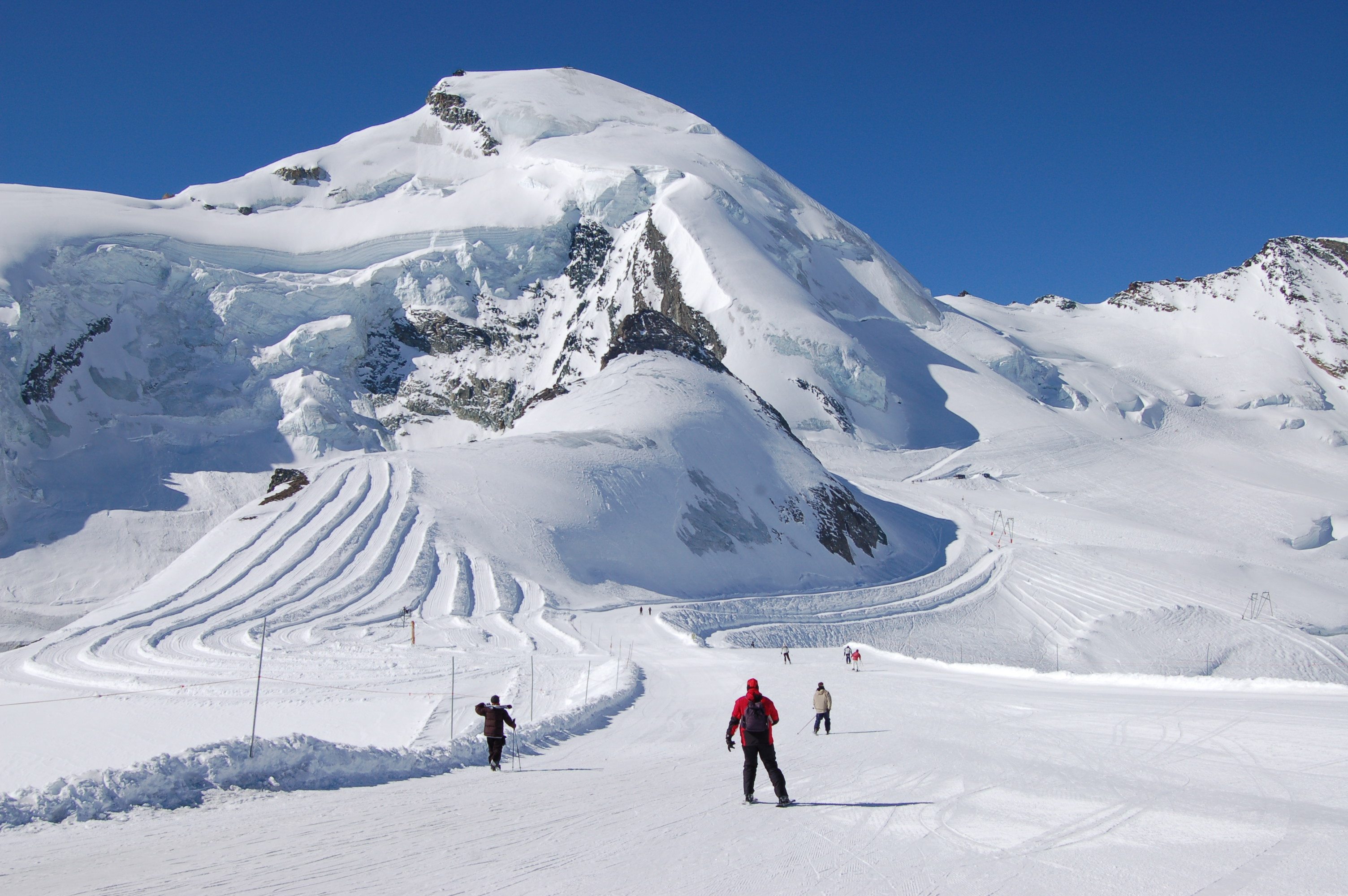 Allalinhorn Saasfee Zermatt Schweiz